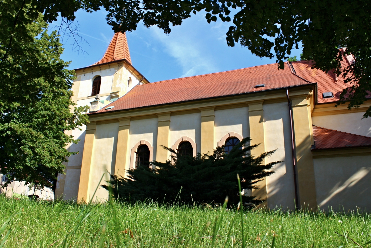 Stochov